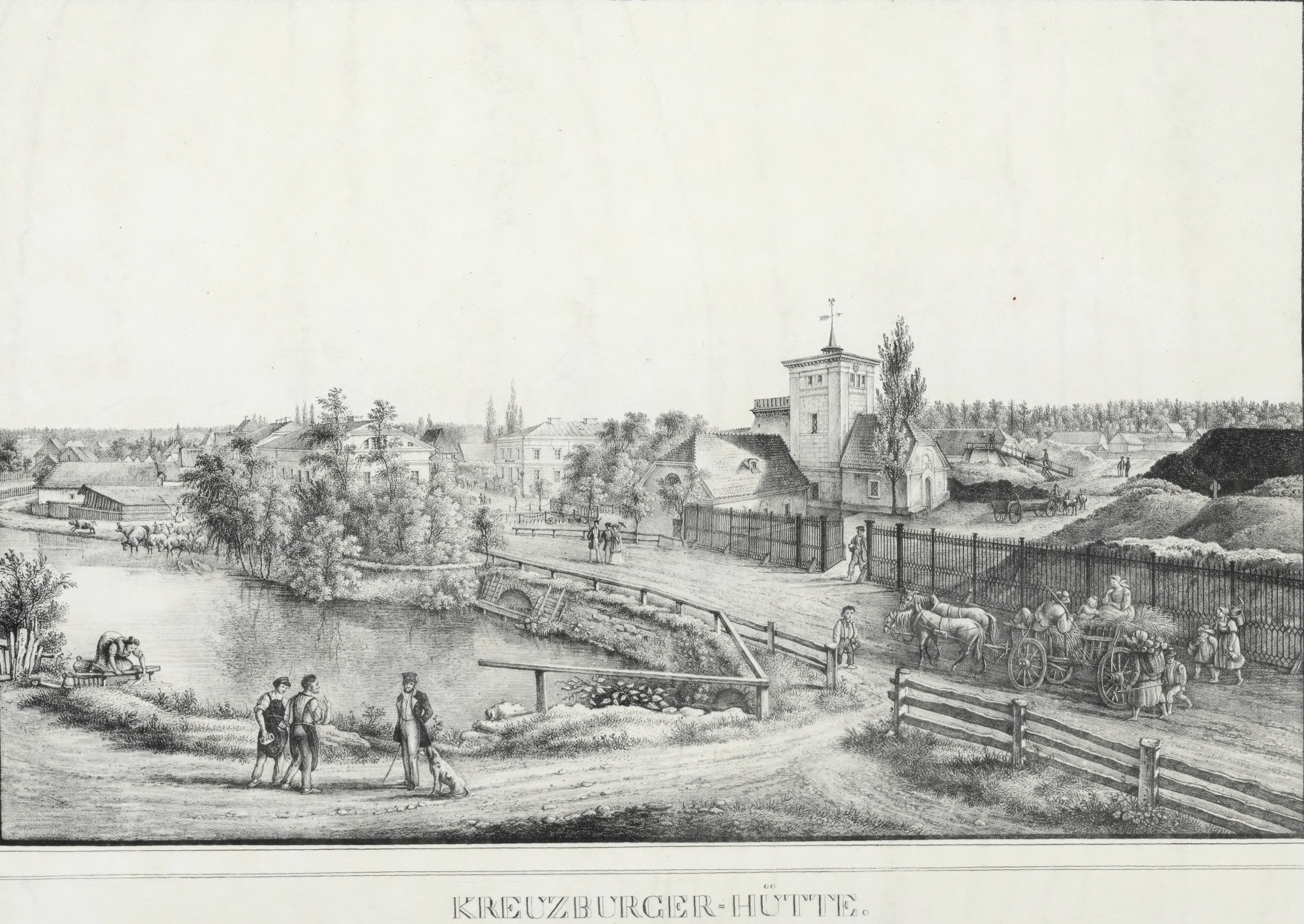 Lithographie von Kreuzburger Hütte in Oberschlesien im 19. Jahrhundert.